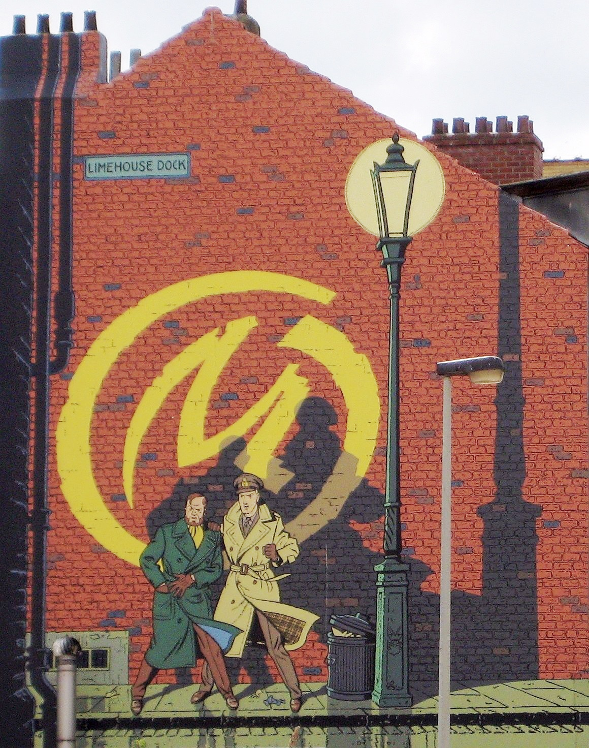 Stripmuur Blake en Mortimer te Brussel